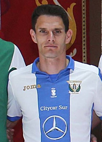 Felicidades pepineros!! Vuestro ascenso a Primera es la historia de un sueño, el resultado de vuestro trabajo y esfuerzo. Sois un orgullo para todo Madrid! Enhorabuena CD Leganés. #LeganésEsDePrimera